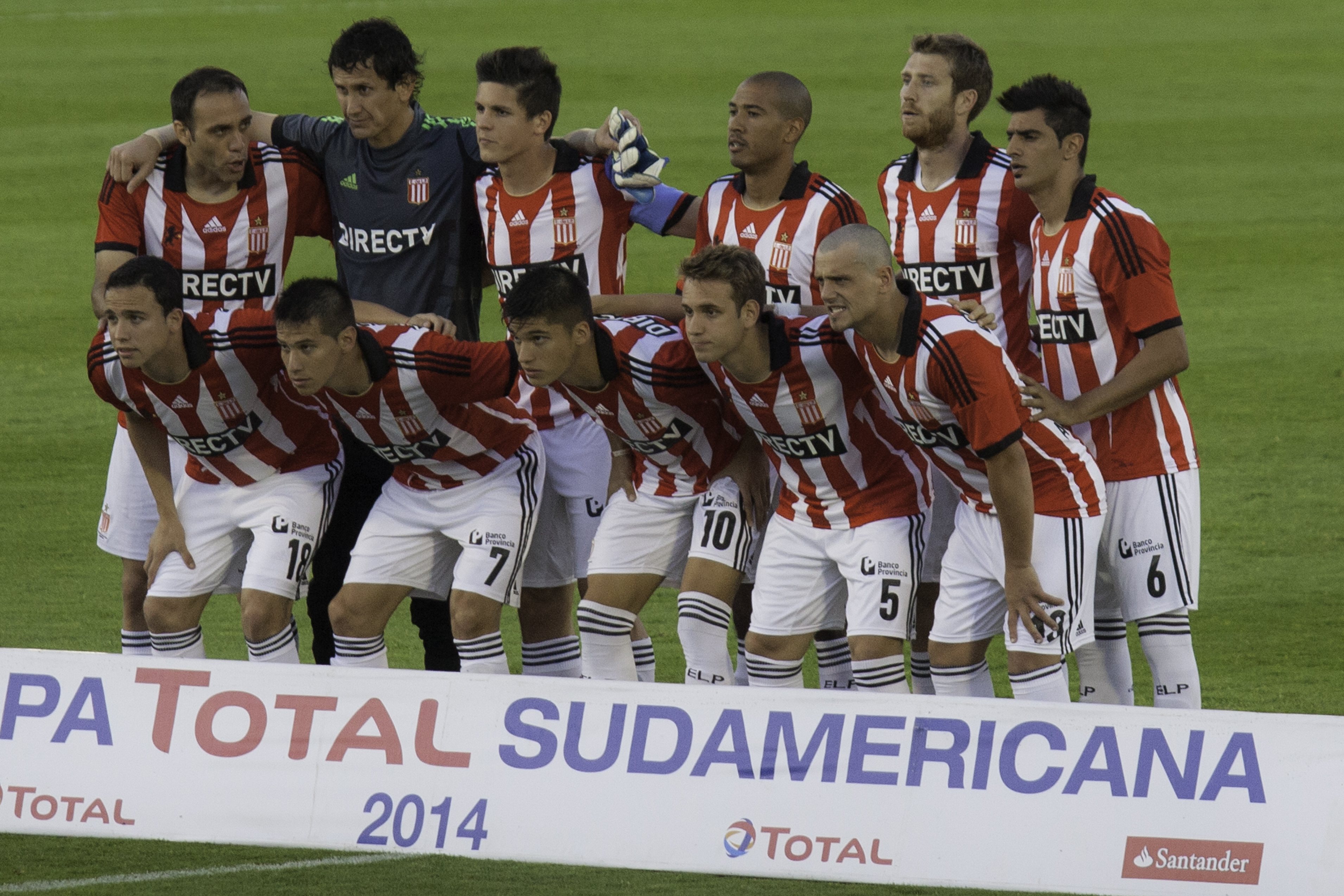 Estudiantes de La Plata starting XI against Penarol in Copa Sudamericana 2014.